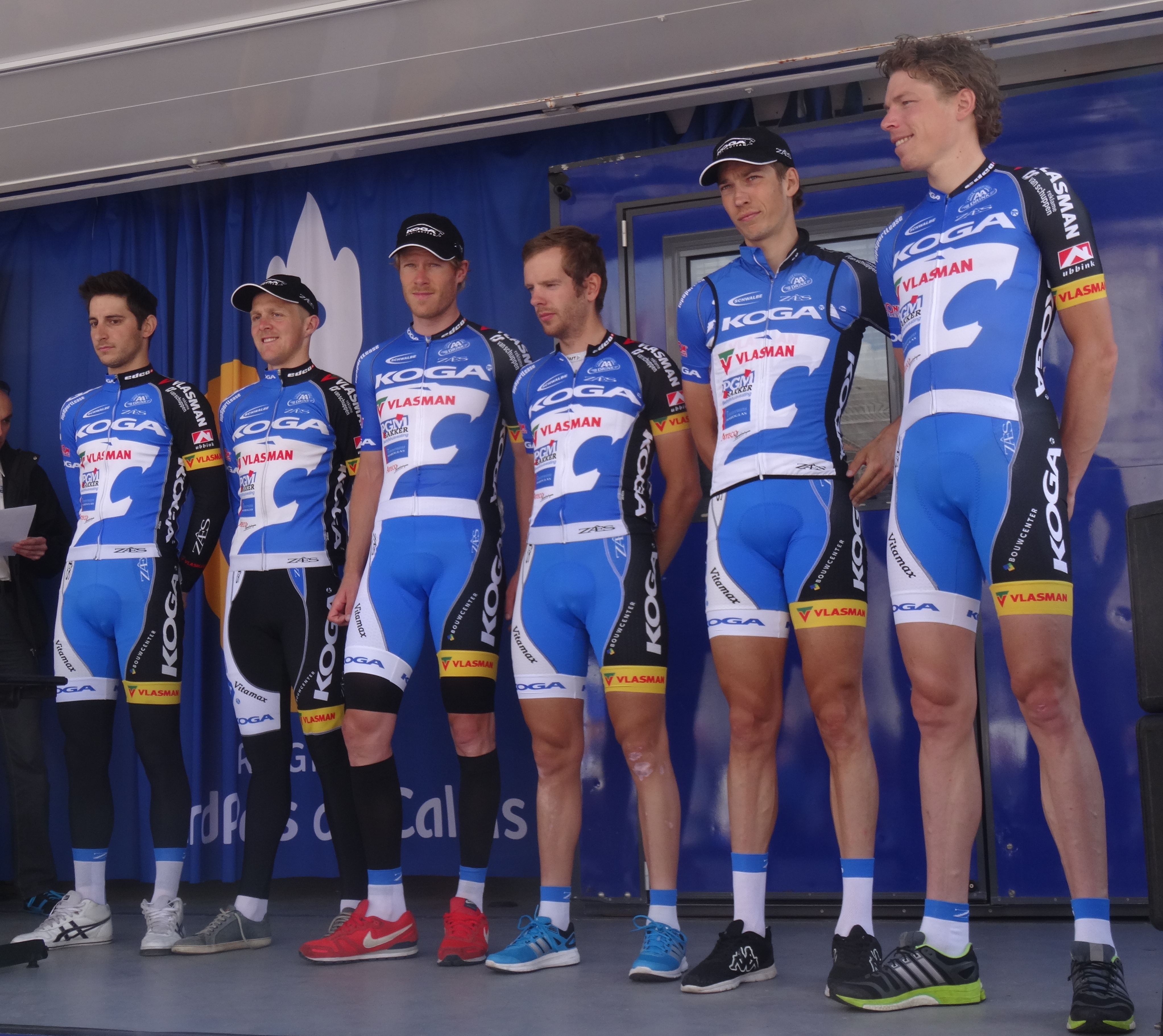 Reportage photographique réalisé le dimanche 25 mai 2014 à l'occasion du départ et de l'arrivée de la troisième étape du Paris-Arras Tour 2014 à Arras, Pas-de-Calais, Nord-Pas-de-Calais, France. Depicted people: Umberto Atzori, Twan Castelijns, René Hooghiemster, Melvin Boskamp, Jasper Bovenhuis and Bart van Haaren Depicted team: Koga